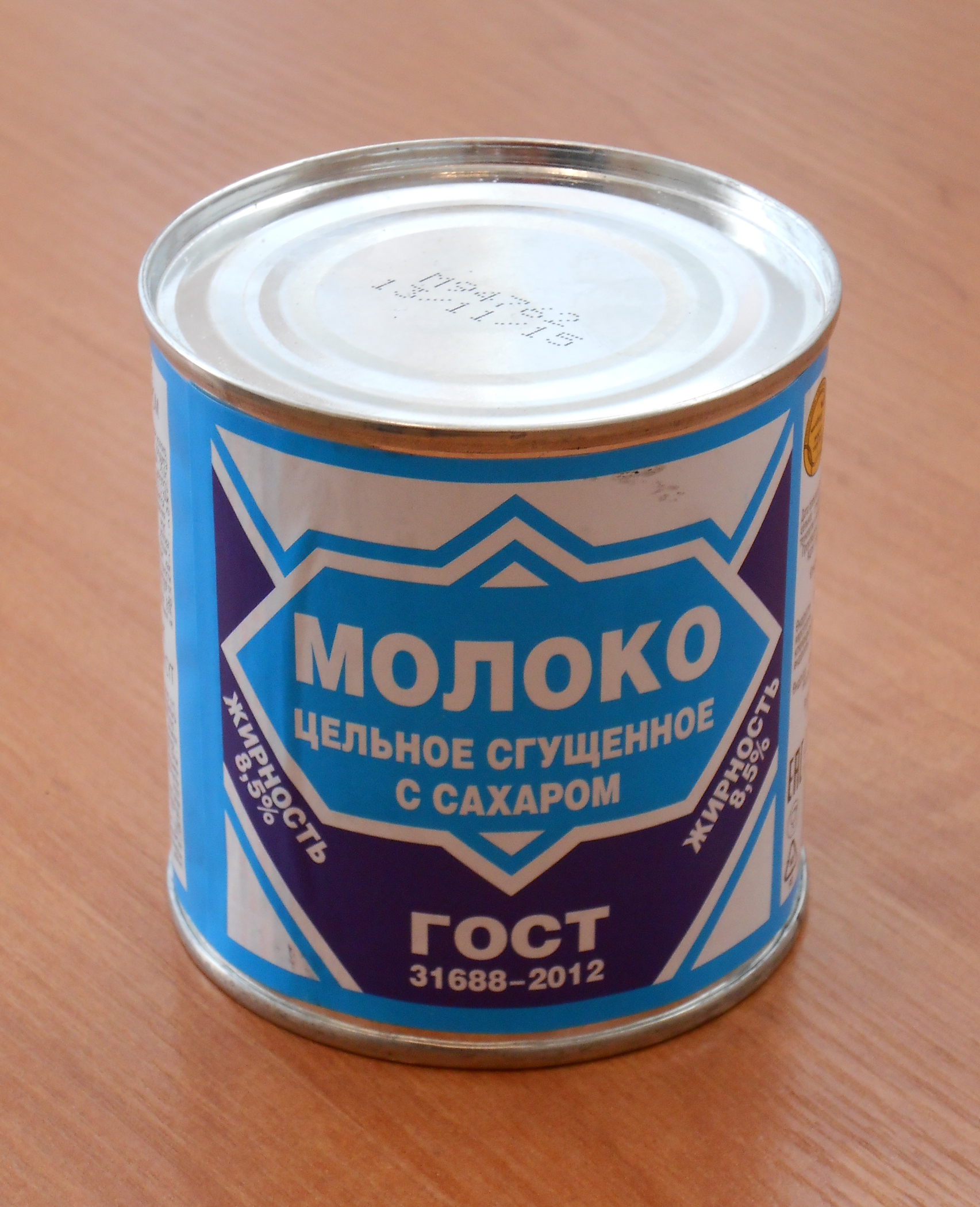 Сгущёнка Верховского молочно-консервного завода. Адрес производства: Россия, Орловская область, пос. Верховье. Баночка 380 грамм. Taken with Nikon Coolpix S2700